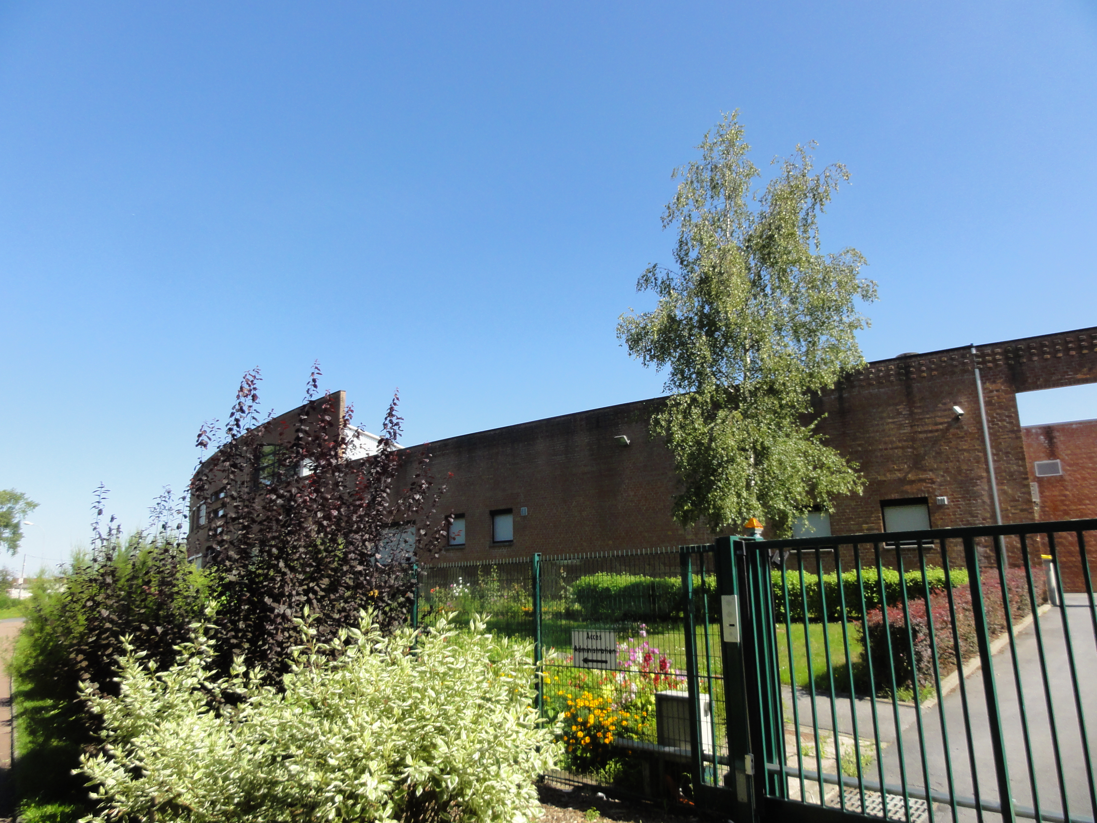 Terril n° 163 dit Enclos Est, disparu, Fosse Enclos de la Compagnie des mines d'Anzin, Denain, Nord, Nord-Pas-de-Calais, France.